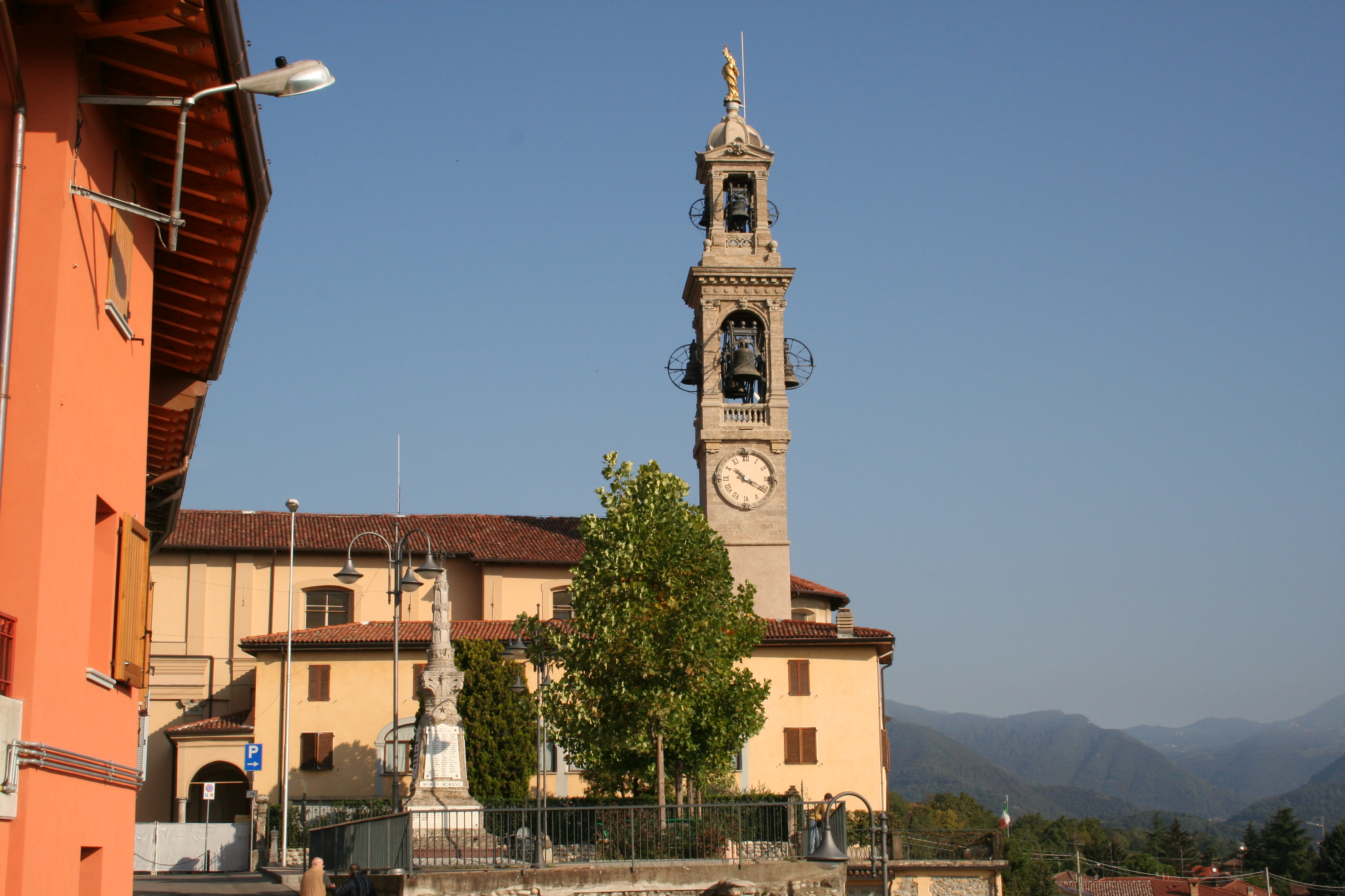 Autore Giorces.